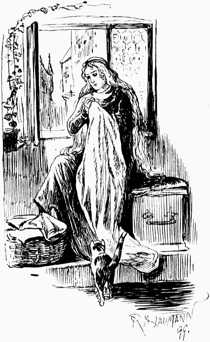 drawn for Arthur Achleitner’s Bayern, wie es war und ist.